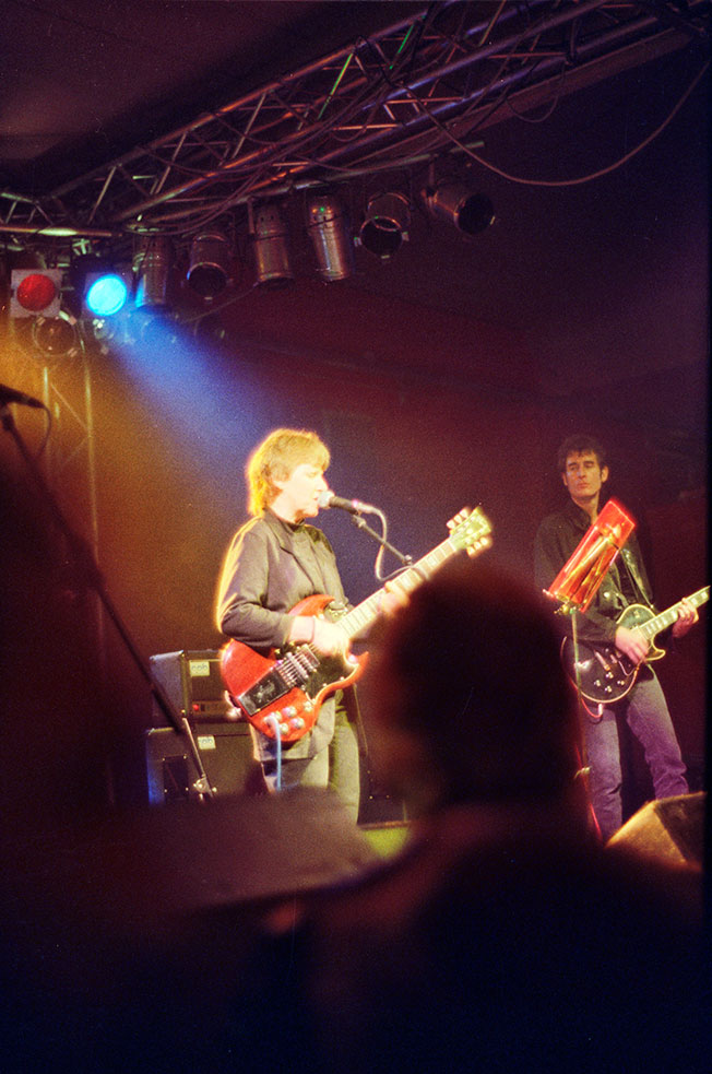 The Moe Tucker Band, Augsburg, Germany, September 1992